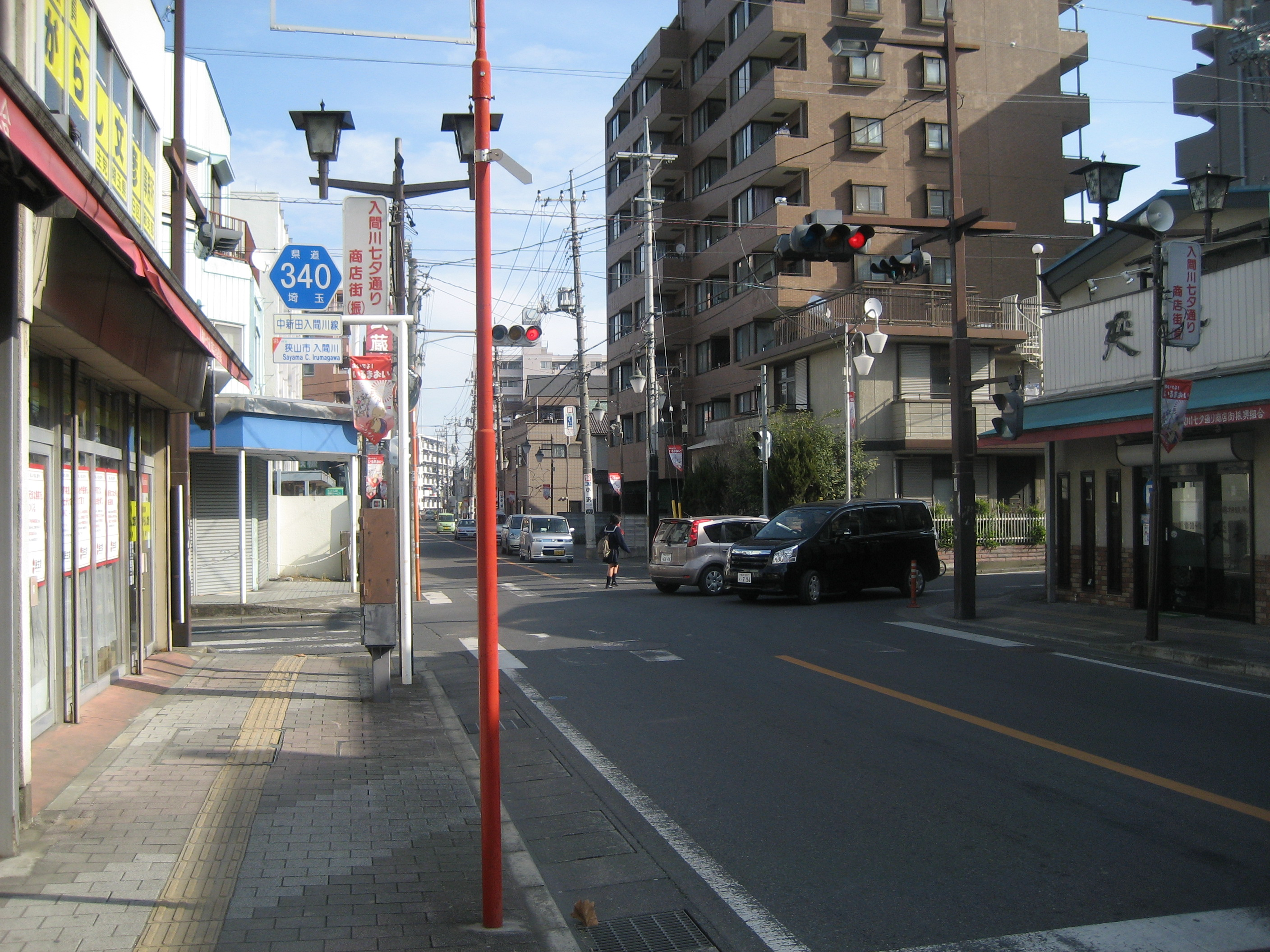 埼玉県道340号線狭山市内